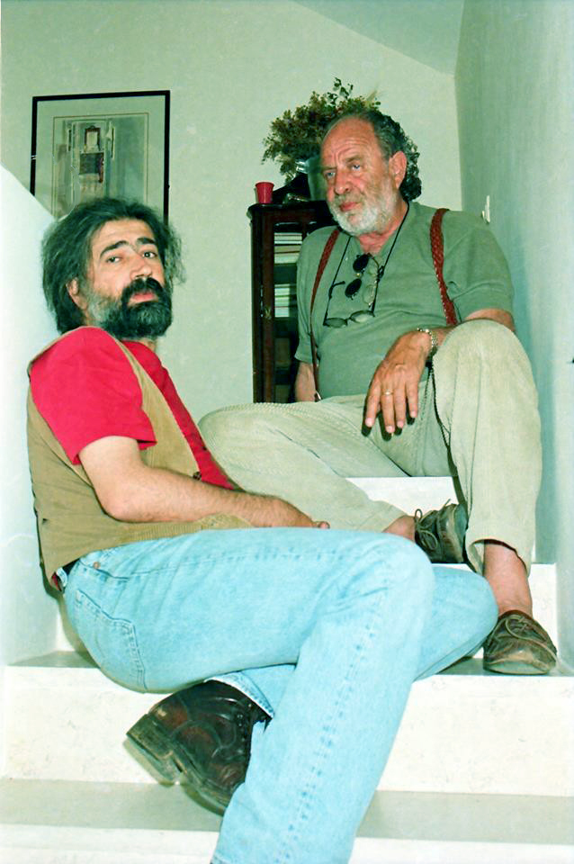 המפיק ישראל רינגל והבמאי חיים בוזגלו